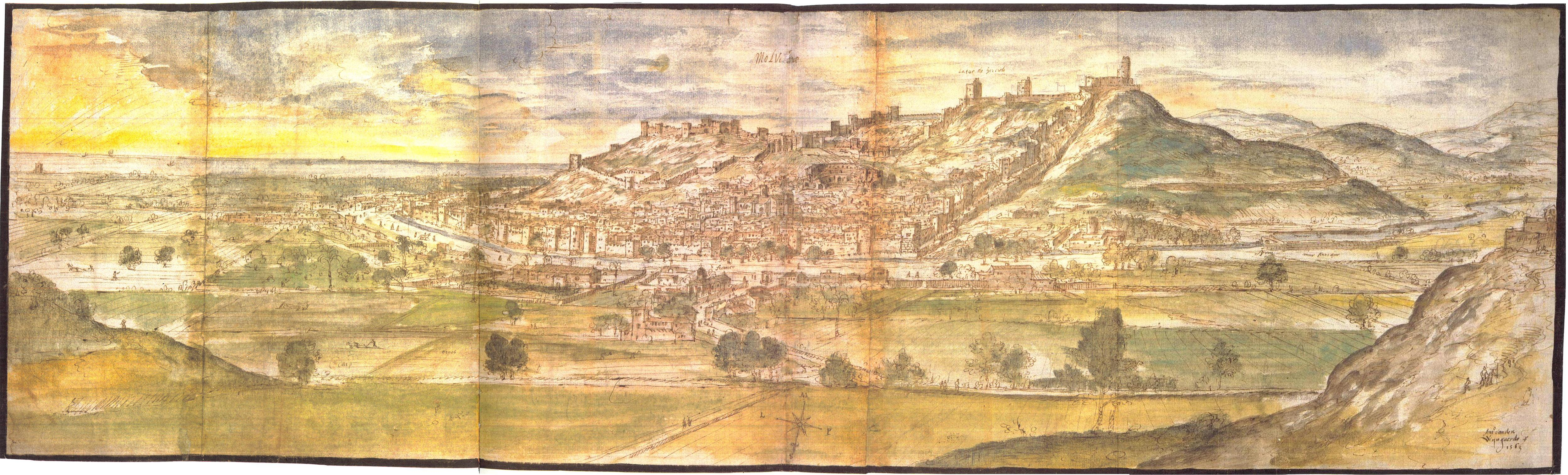 Vista de Murviedro (Sagunto) realizada por Wyngaerde en 1563 para Felipe II